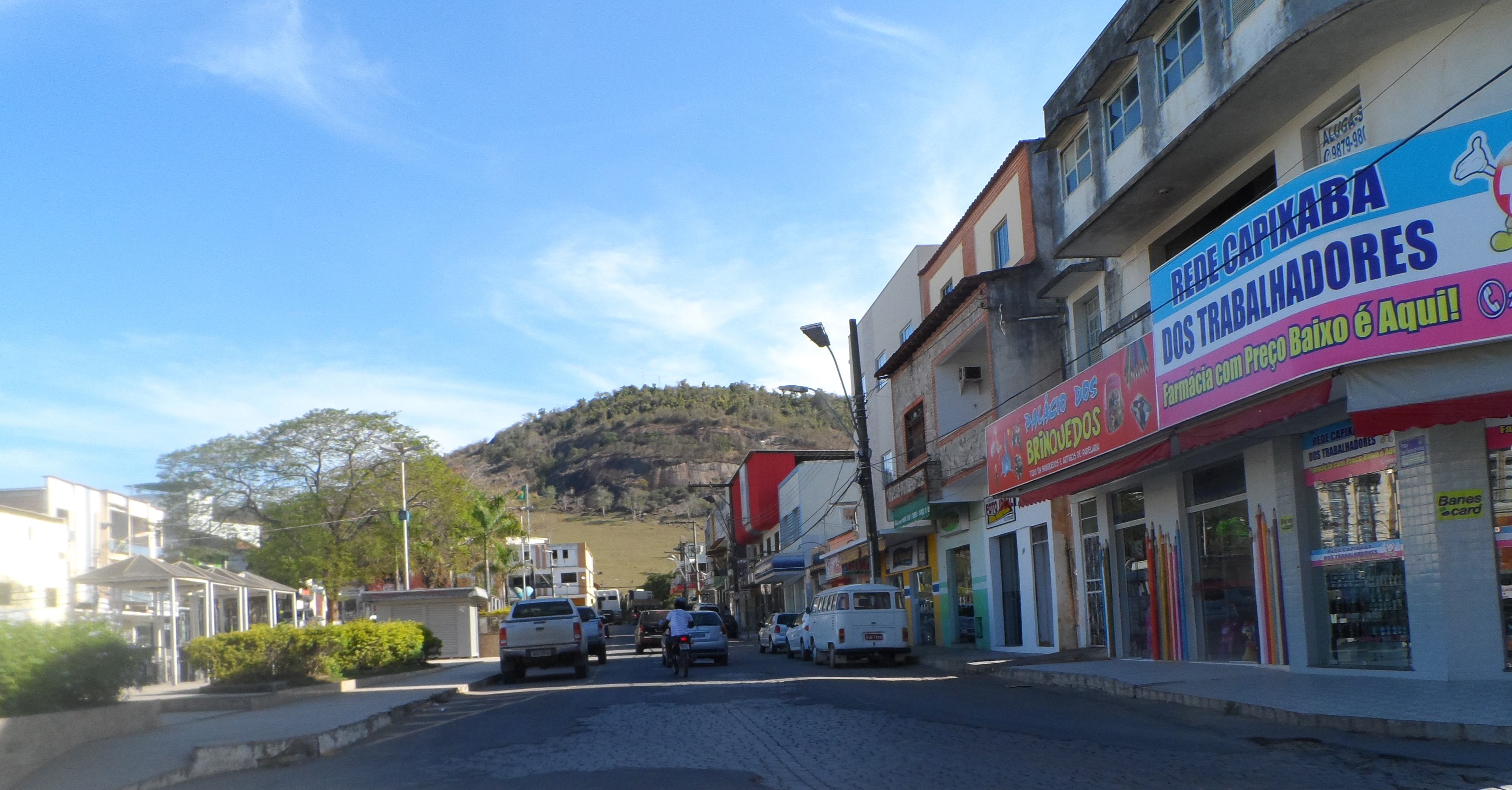 Ecoporanga-ES